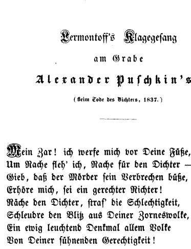 Из книги Gesammelte Schriften: Gesammt-Ausg. in zwölf Bänden. Berlin. 1852. Первая публикация стихотворения Лермонтова "На смерть Пушкина" (на немецком языке)